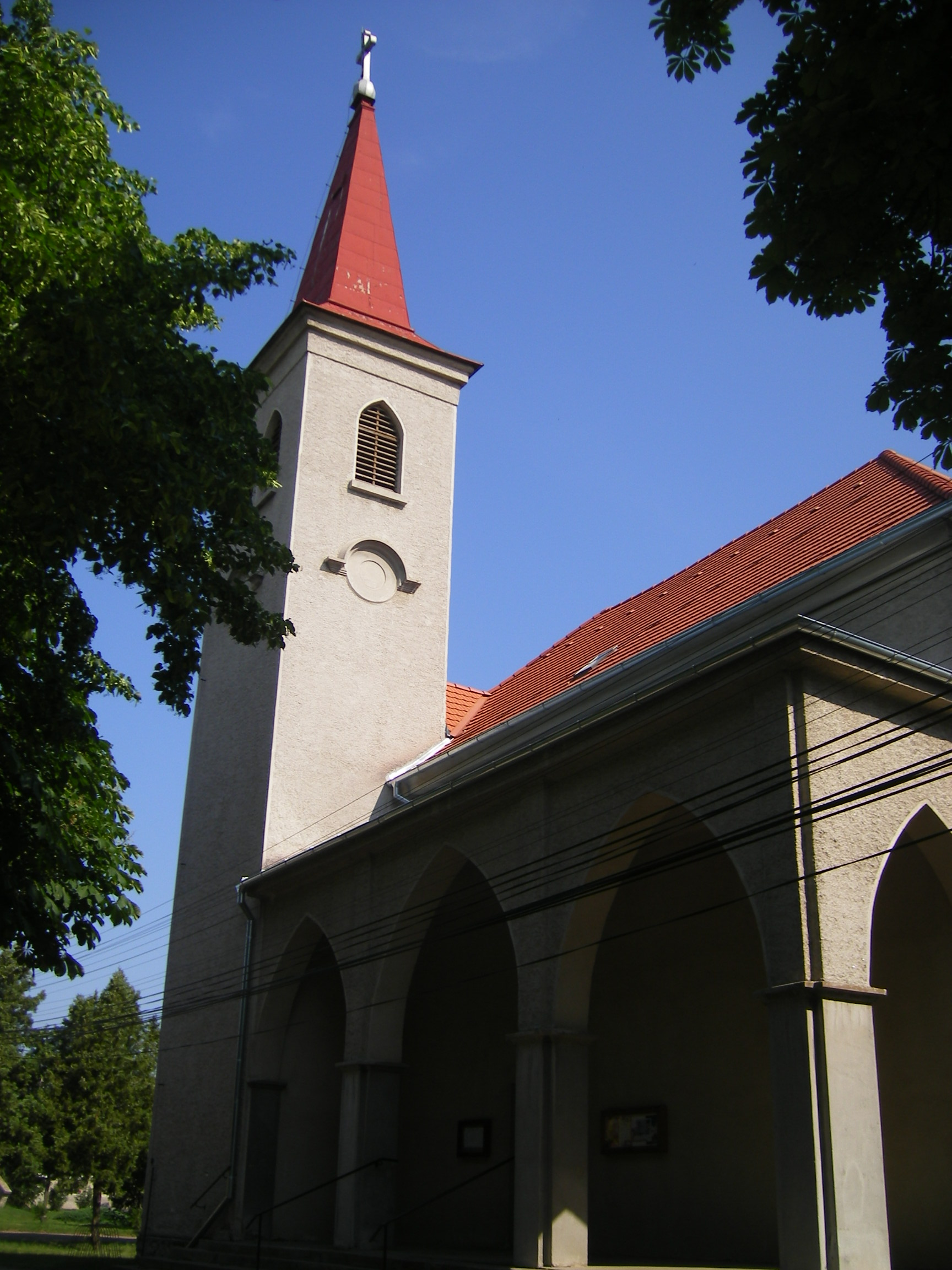 Szilasháza, katolikus templom